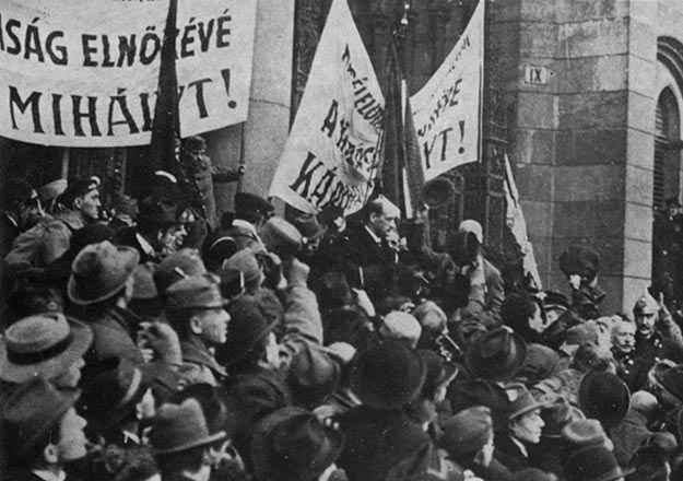 A Népköztársaság kikiáltása 1918. november 16-án. A Parlament lépcsőjén Károlyi Mihály.